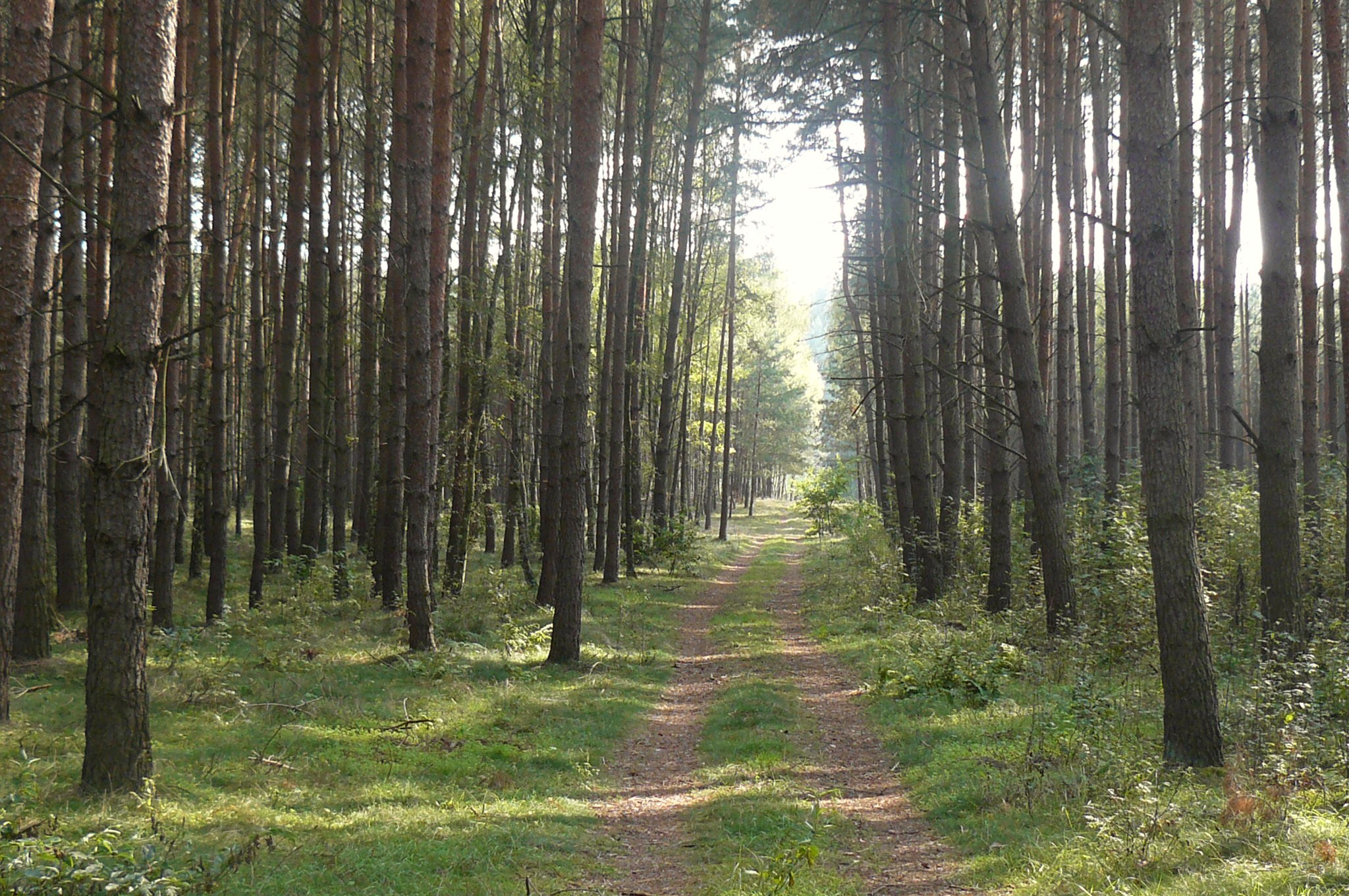 Lasy okolic Wioski.